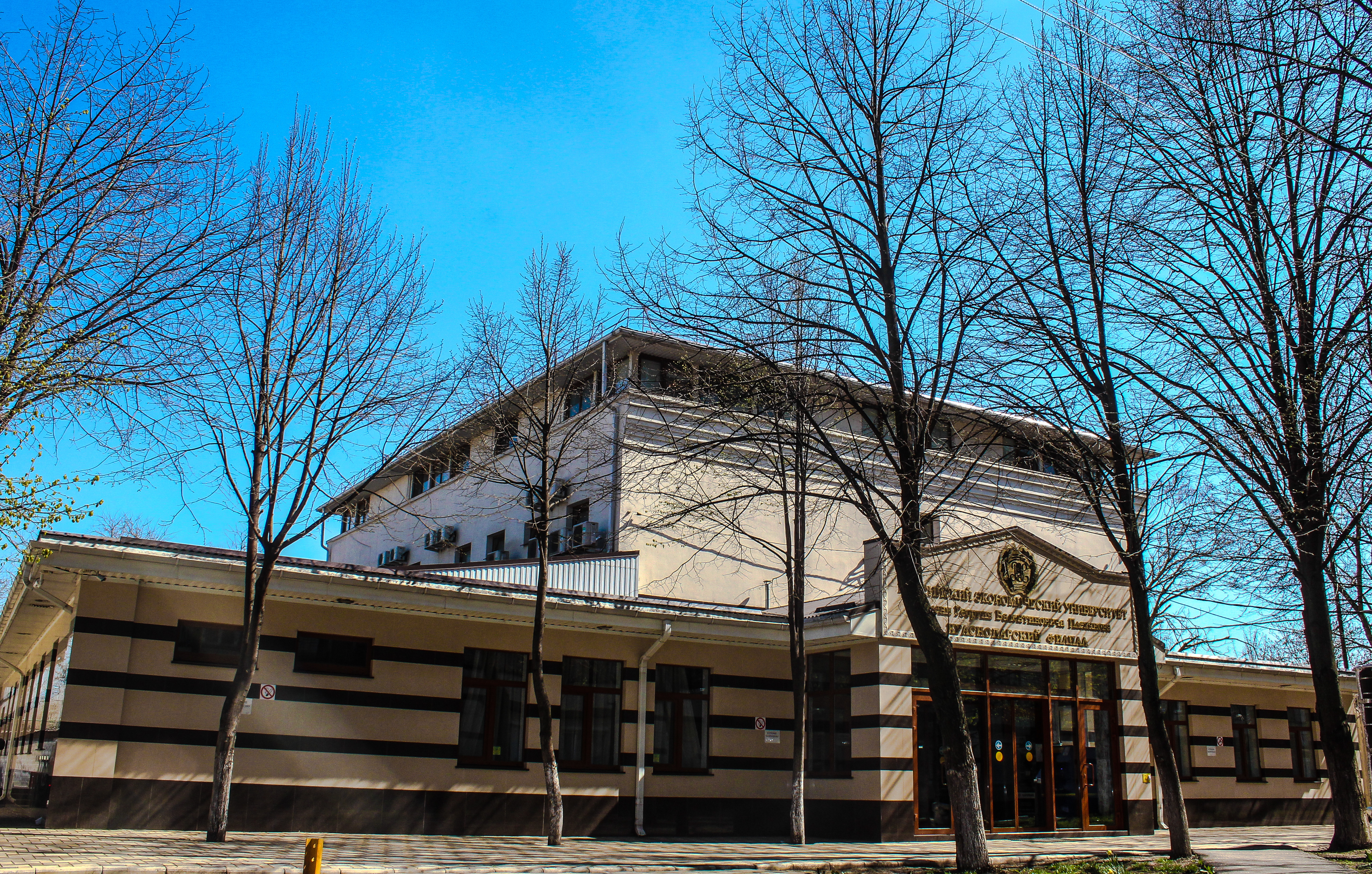 Фотография корпуса Краснодарского филиала РЭУ им. Плеханова по адресу Садовая, 23